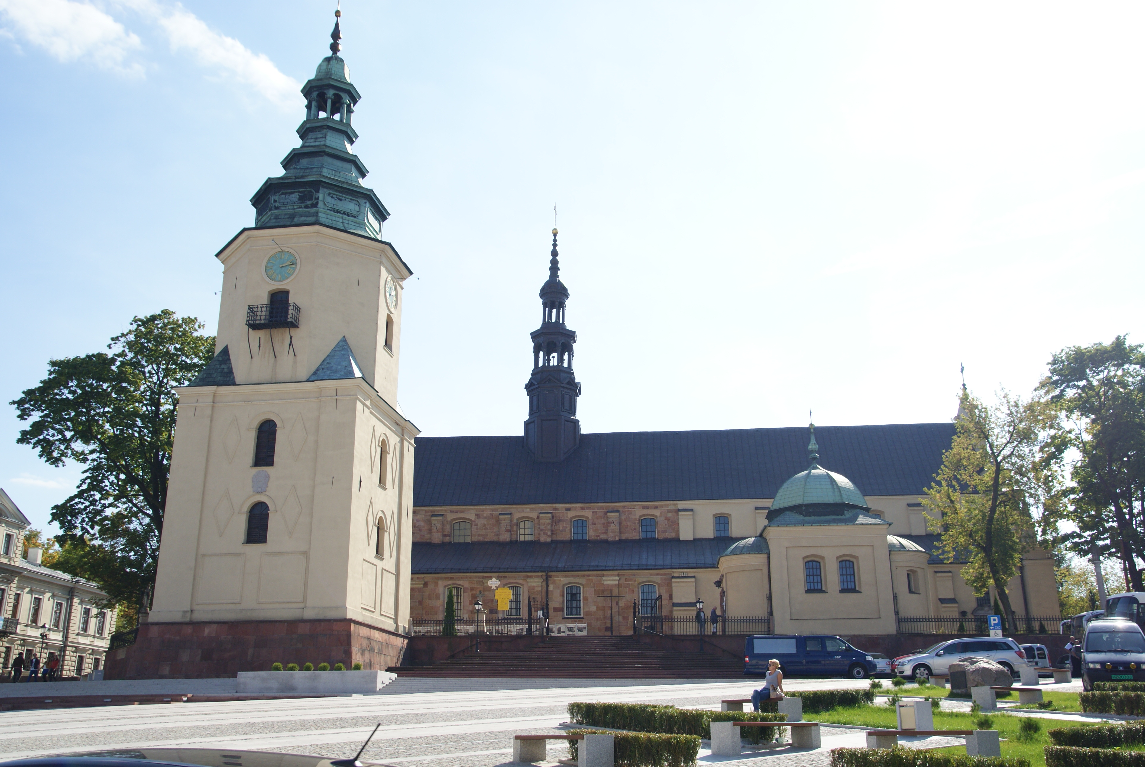 Zespół katedralny Wniebowzięcia NMP: katedra, XII, XVI-XVIII, 1869-72 kaplica ogrójcowi, 1760 dzwonnica, poł. XVII, 1727 Kielce ul. Jana Pawła II (?), Kielce 322/1-3 z 27.06..